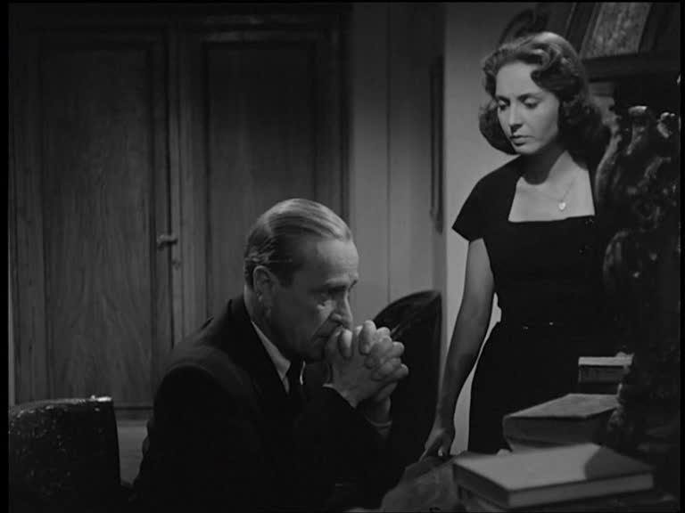 Screenshot del film Atto di accusa, 1950, regia di Giacomo Gentilomo.